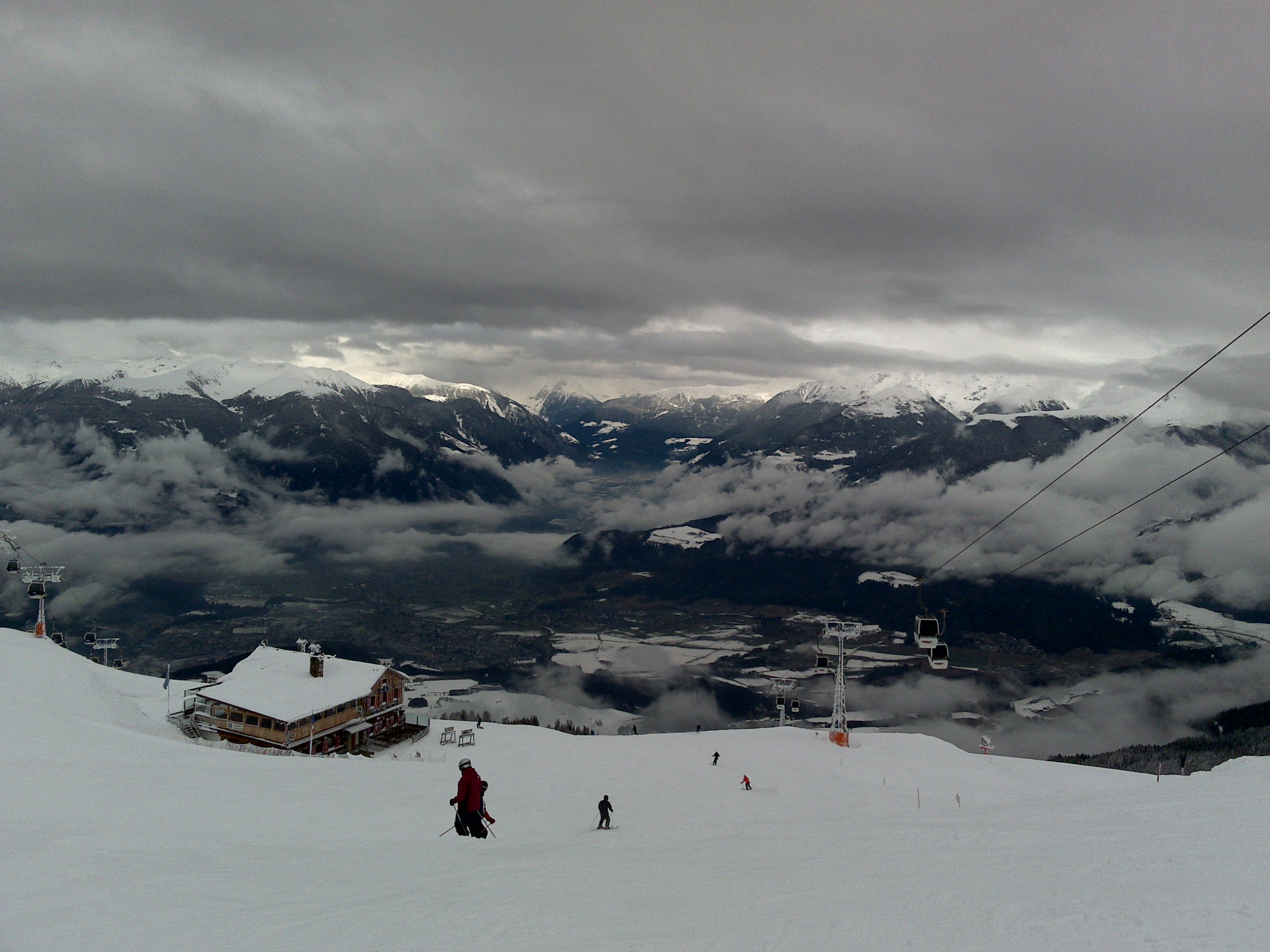 kronplatz